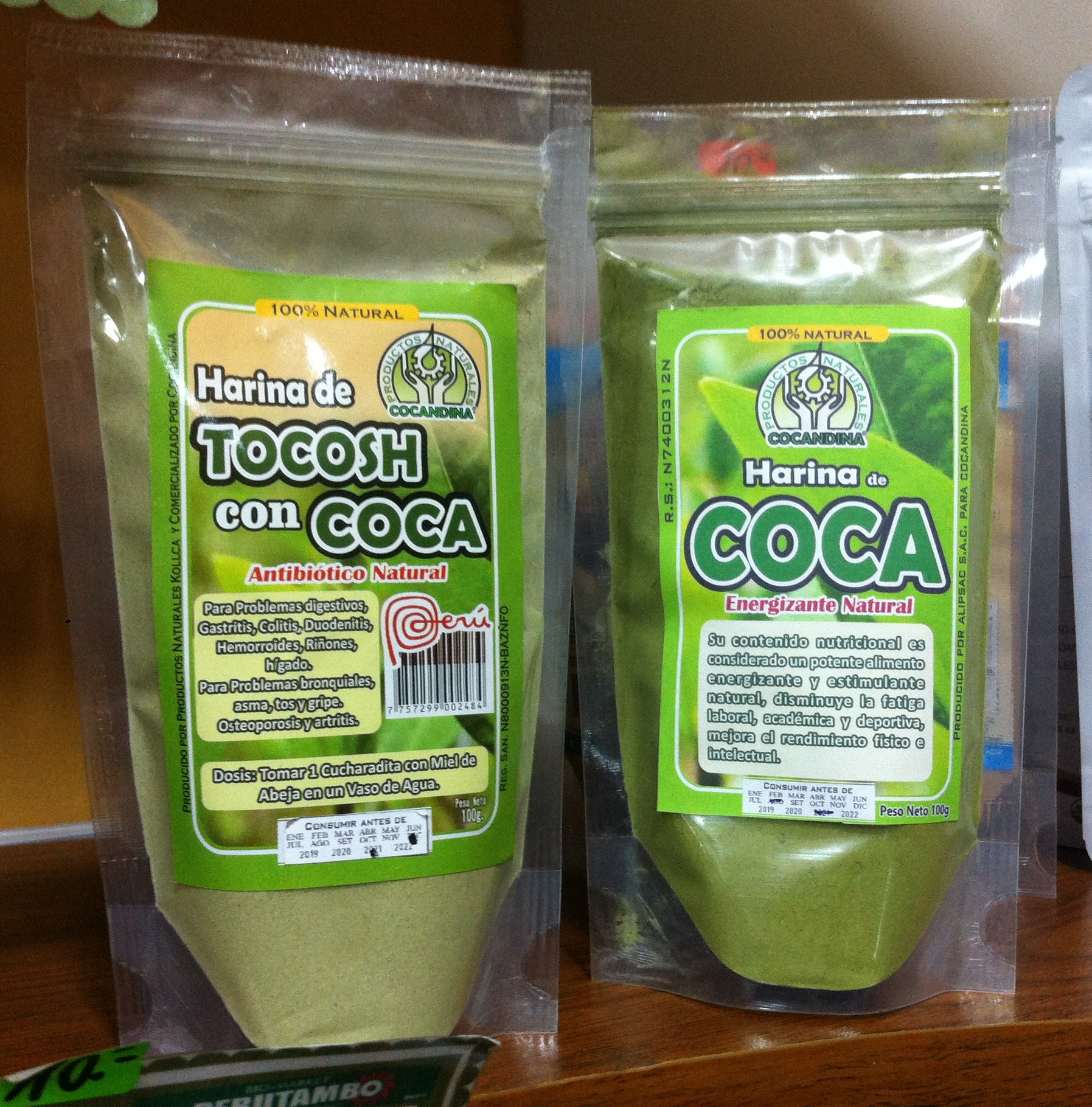 Harinas de coca, pura y mezclada con harina de tocosh. Productos elaborados en Perú.